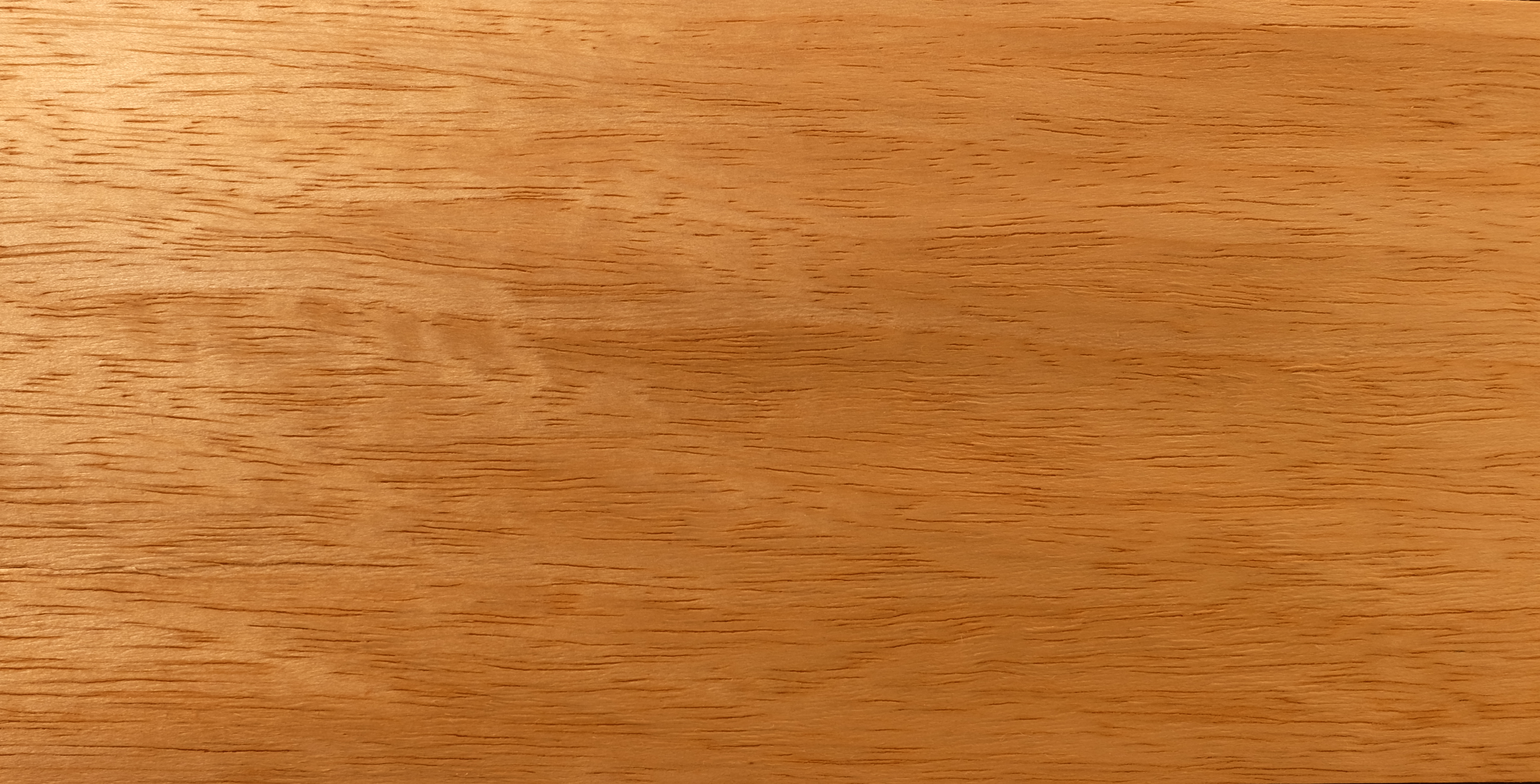 gemessertes Furnier; Holzart: LMB, Limba, Fraké, Ofram, White Afara